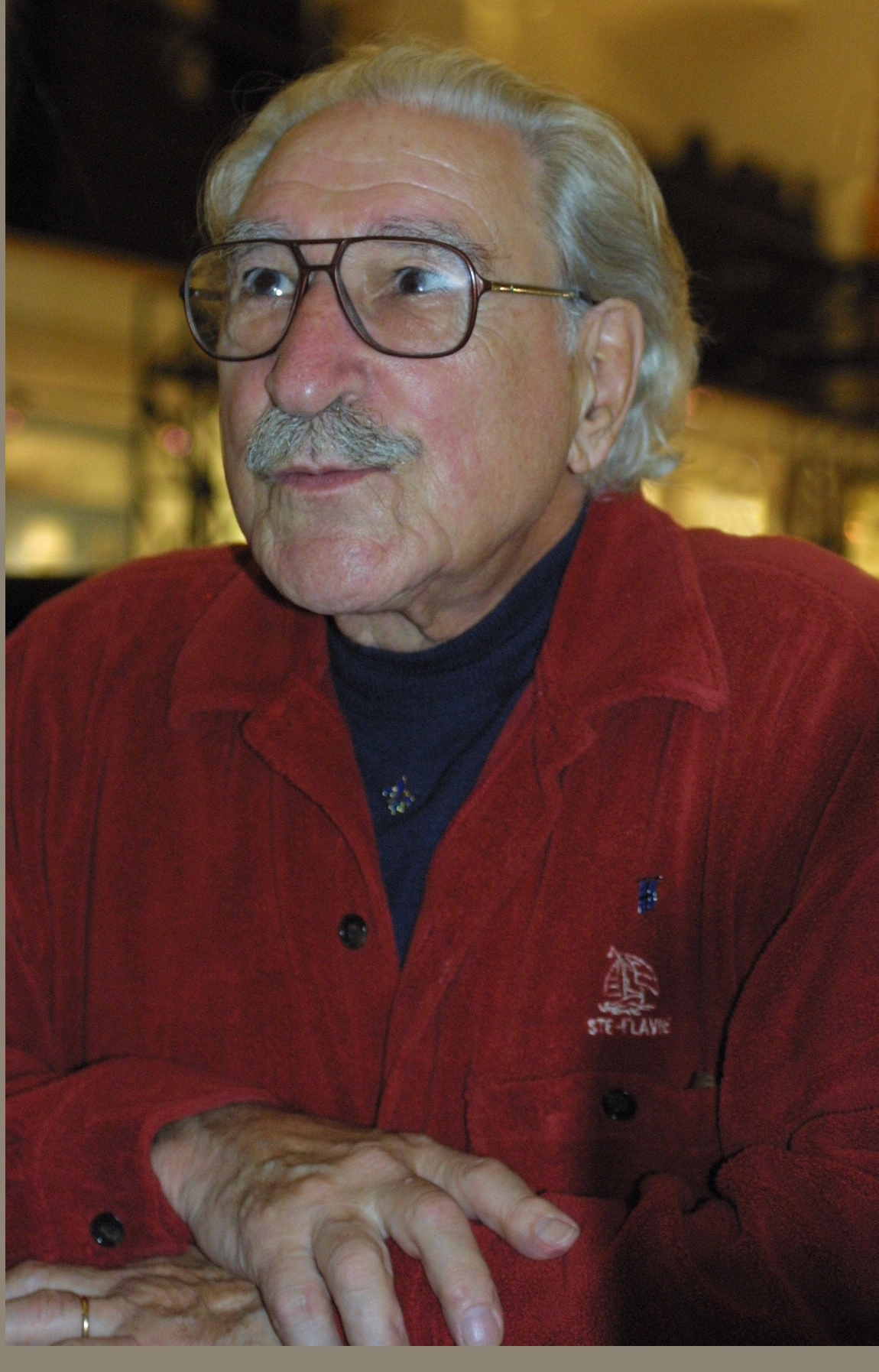 Michel Chartrand au lancement du livre de Fernand Foisy chez Lanctôt Éditeur: Michel Chartrand - La colère du juste 1968-2003